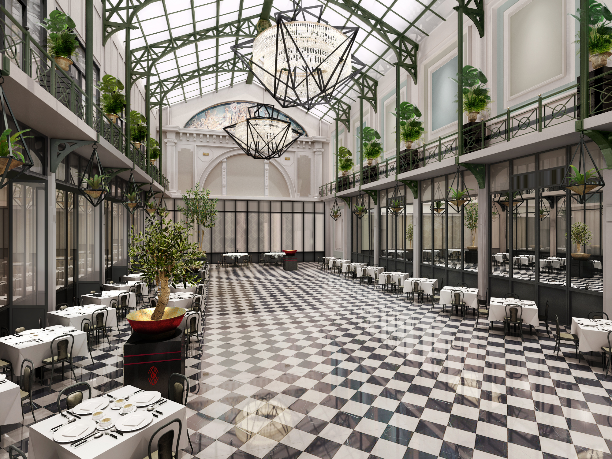 Wintertuin - NH Collection Grand Hotel Krasnapolsky